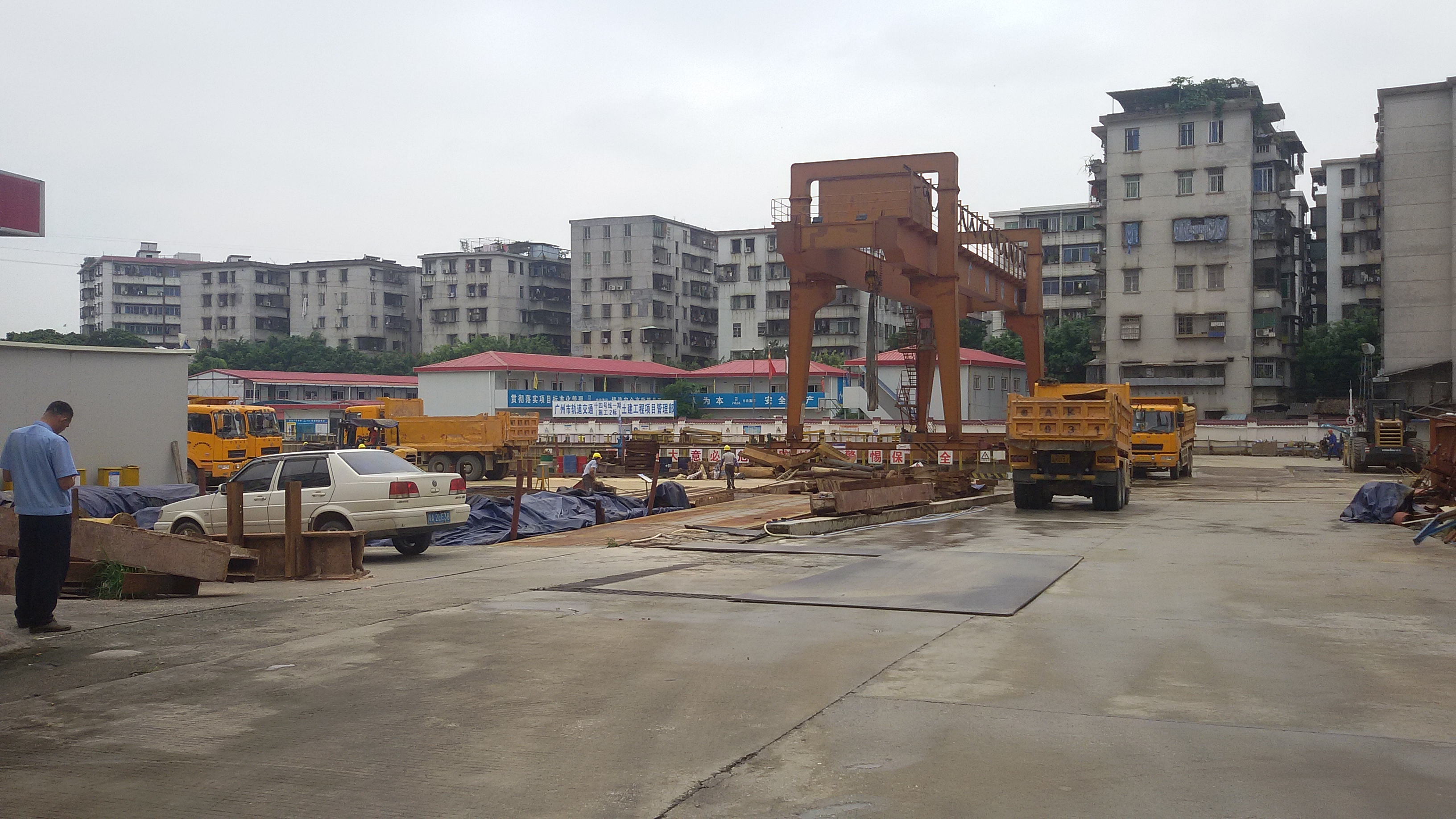 粵語: 2017年5月25号，街口站喺度起紧。